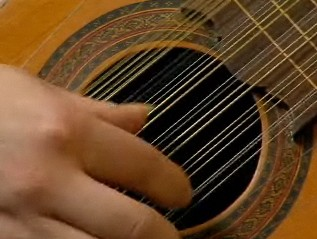 Encordadura del guitarrón chileno.